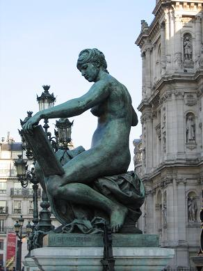 Statue : allégorie de la Science par Jules Blanchard. Située sur le parvis de l'Hôtel de Ville à Paris. Photographiée le 25 novembre 2004 par Marc Baronnet.